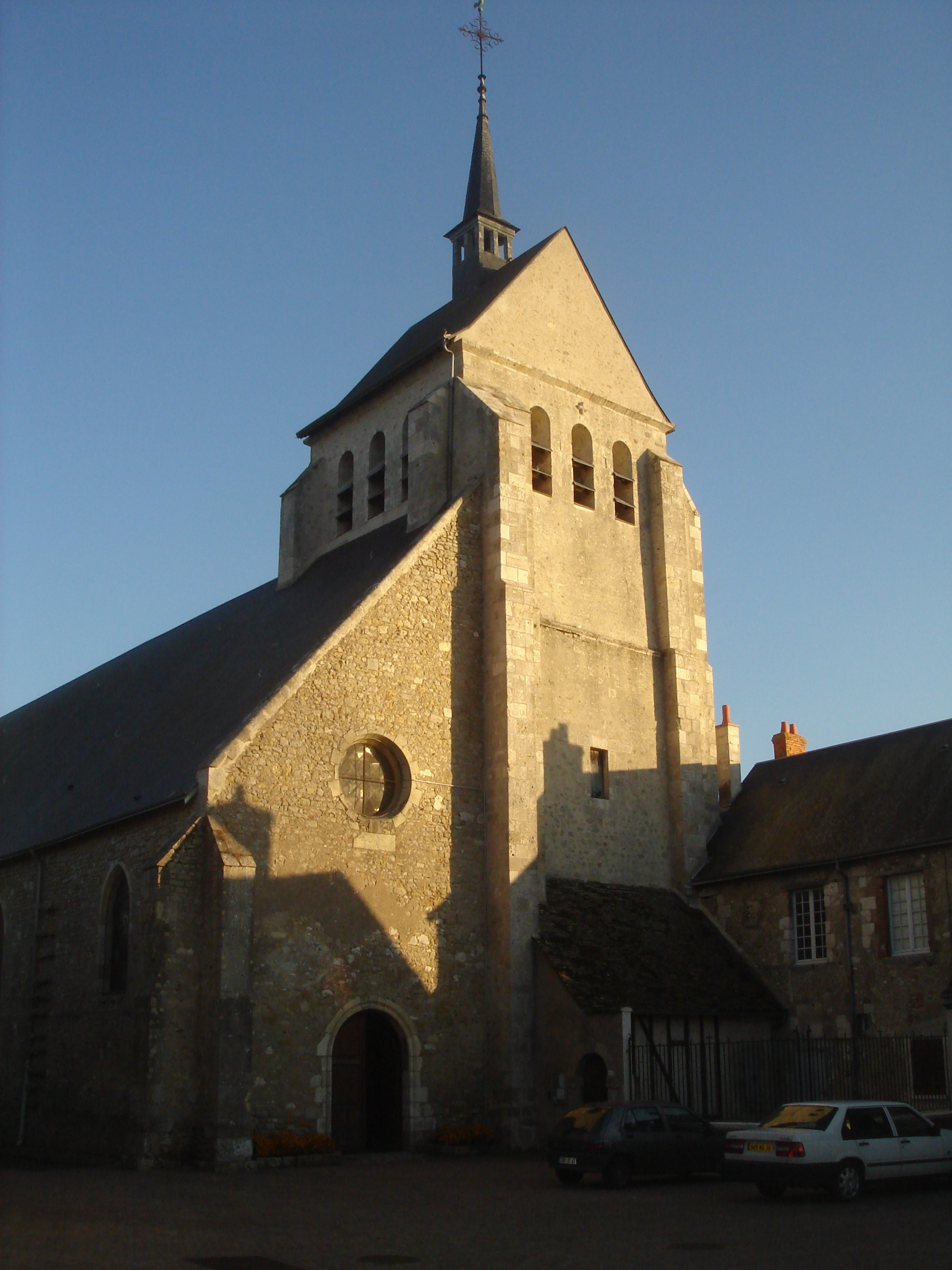 Église Saint-Denis de Saint-Denis-de-l'Hôtel, Loiret, France.